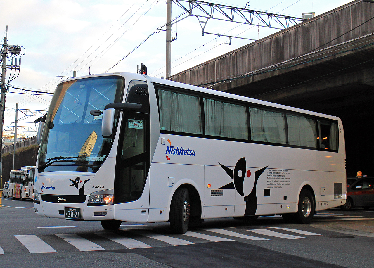 登録番号 福岡200か30-21 車番：4873 西日本鉄道㈱博多自動車営業所所属 夜行高速用車両 2017年12月 博多バスターミナルにて撮影 撮影者 Zondag2000